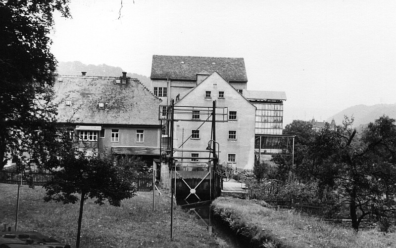 Original image description from the Deutsche Fotothek Freital-Hainsberg. Mühle Hainsberg-Coßmannsdorf